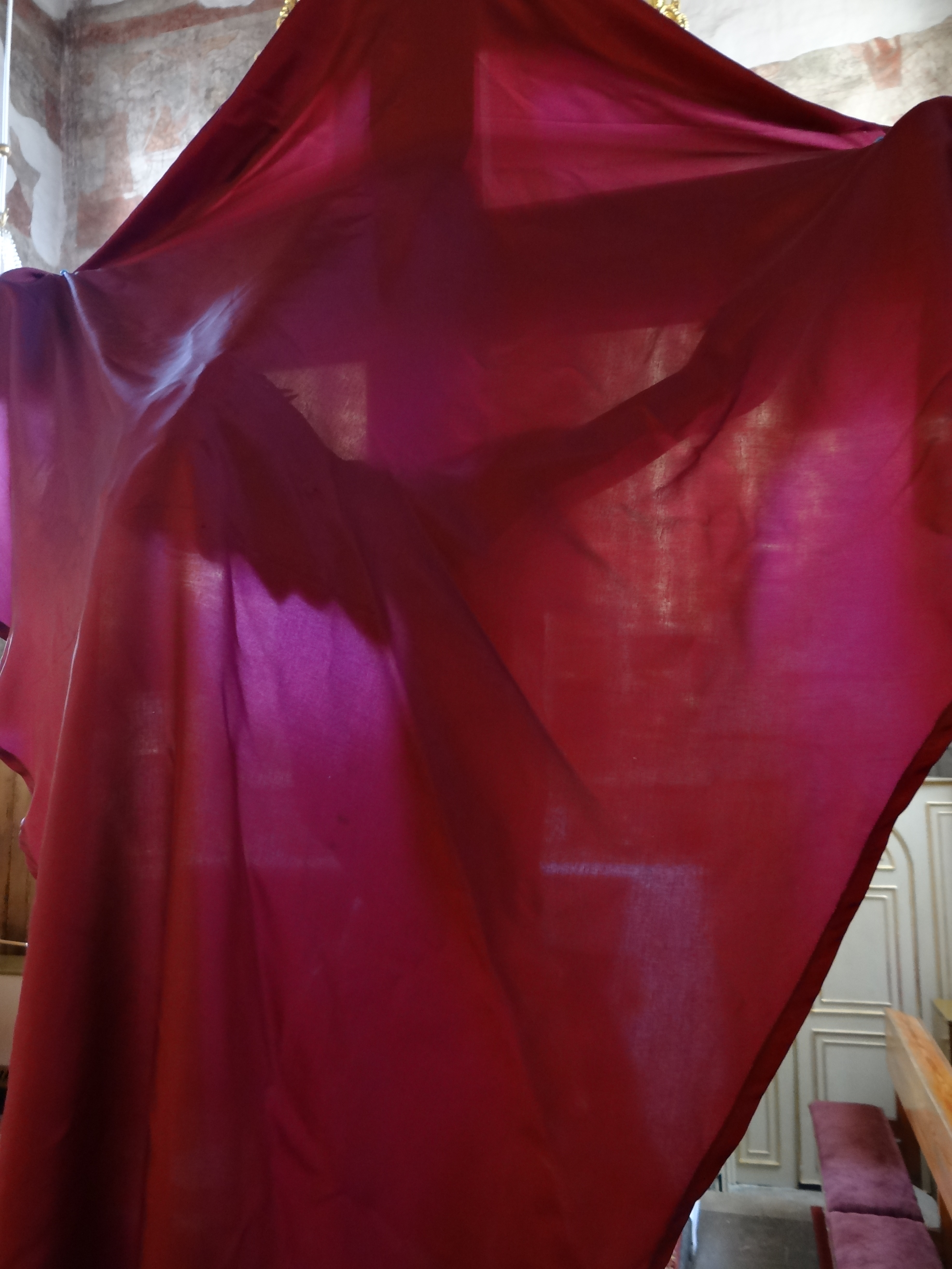 Prandocin, kościół par. pw. św. Jana Chrzciciela, XII, XIX